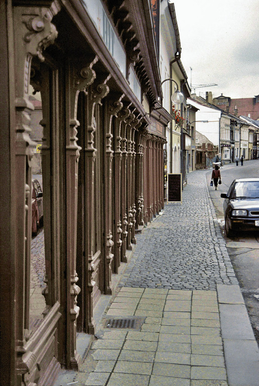 Polička, Okres Svitavy, Czech Republic: wooden show cases in classicist style, ul. Riegrova od Palackého náměstí.